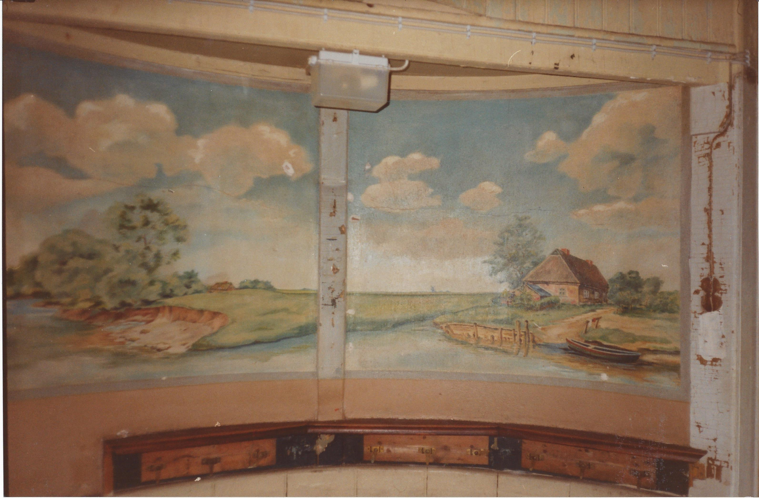 Ausschnitt des Wandbildes im Leuchtturm Roter Sand vor der Restaurierung.